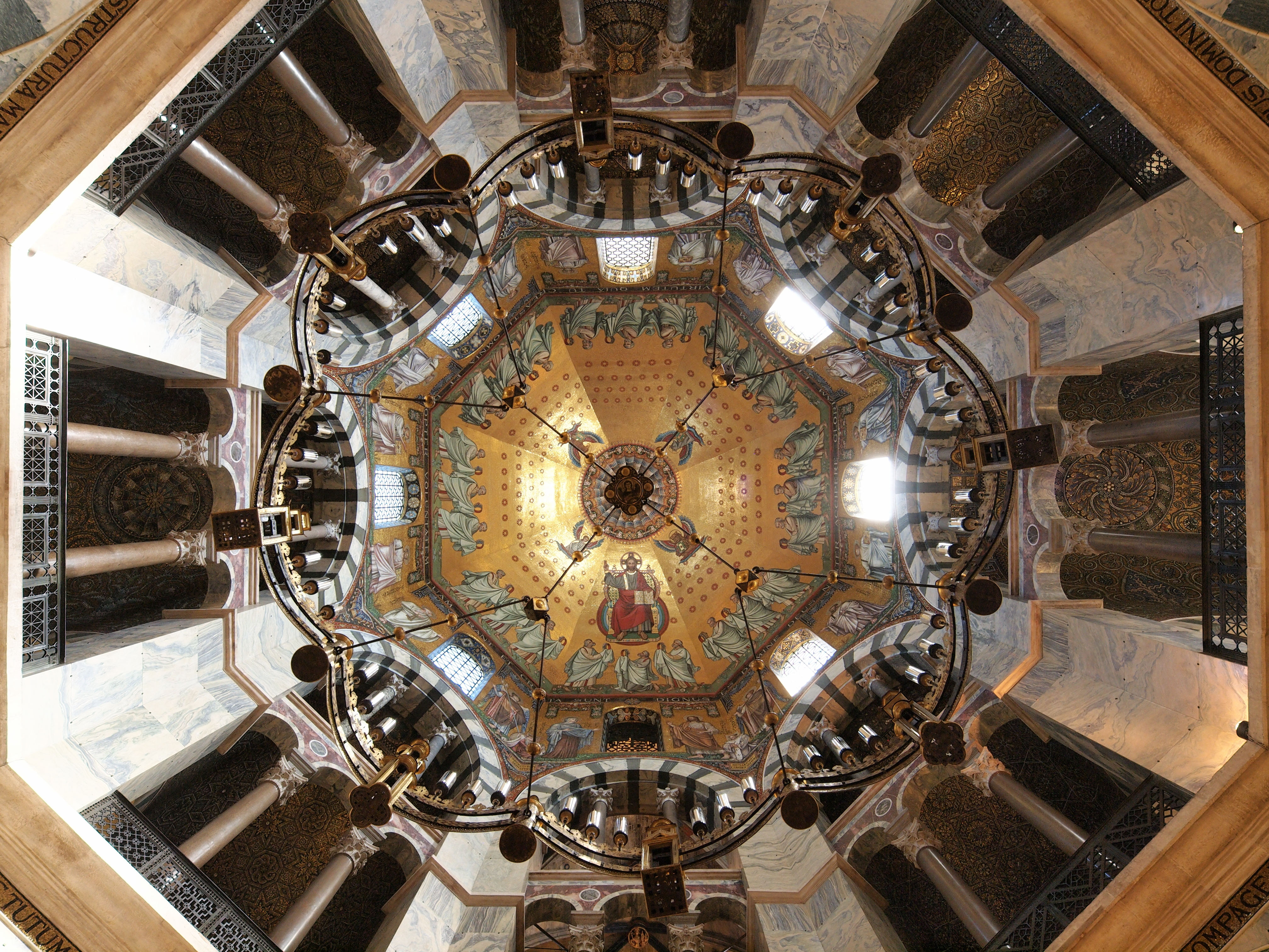 Blick durch den Barbarossaleuchter in die Kuppel des Oktogons im Dom in Aachen, Denkmal